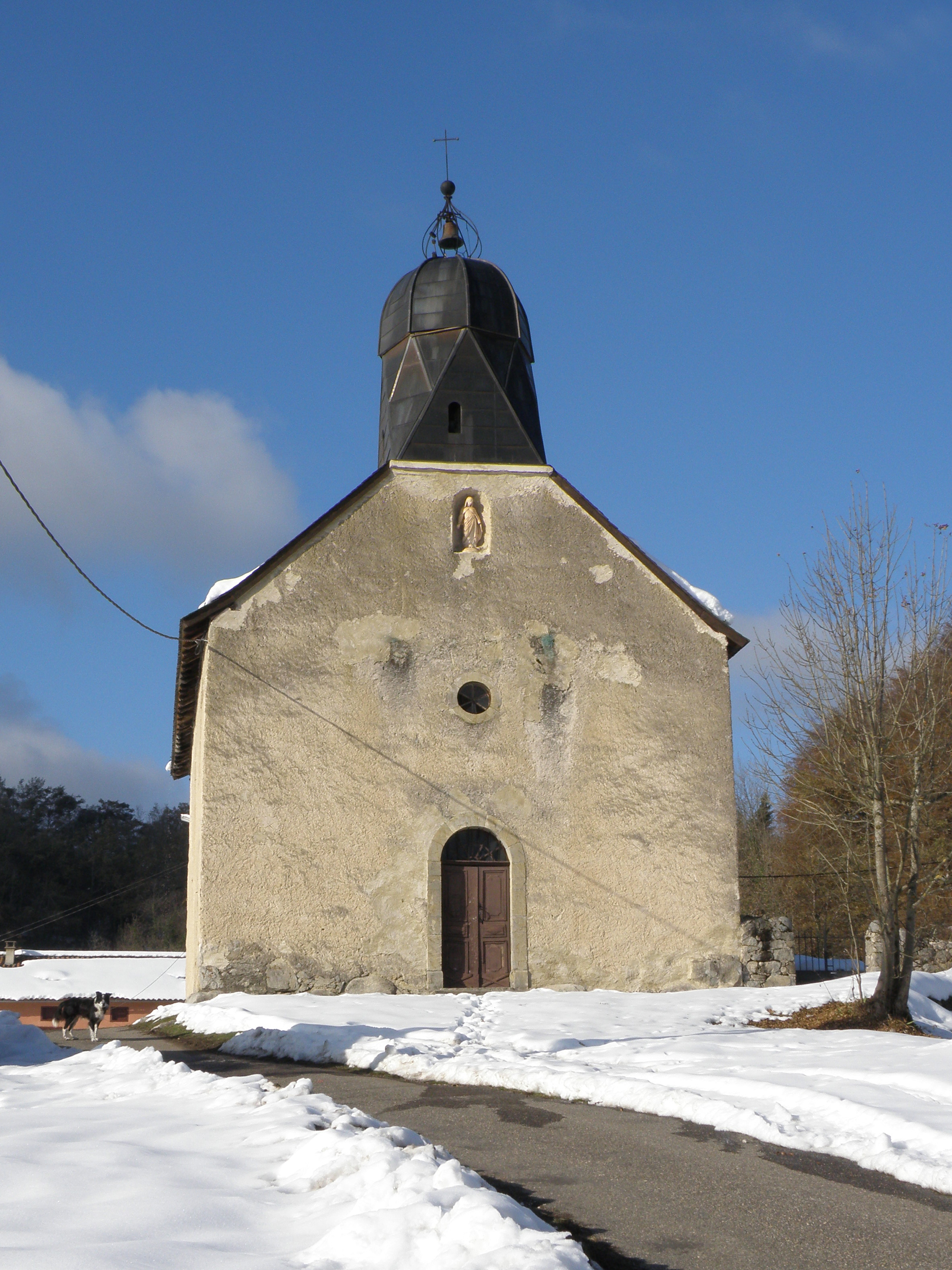 L'église de Cominac (Ercé, Ariège, France) et son clocher caractéristique.